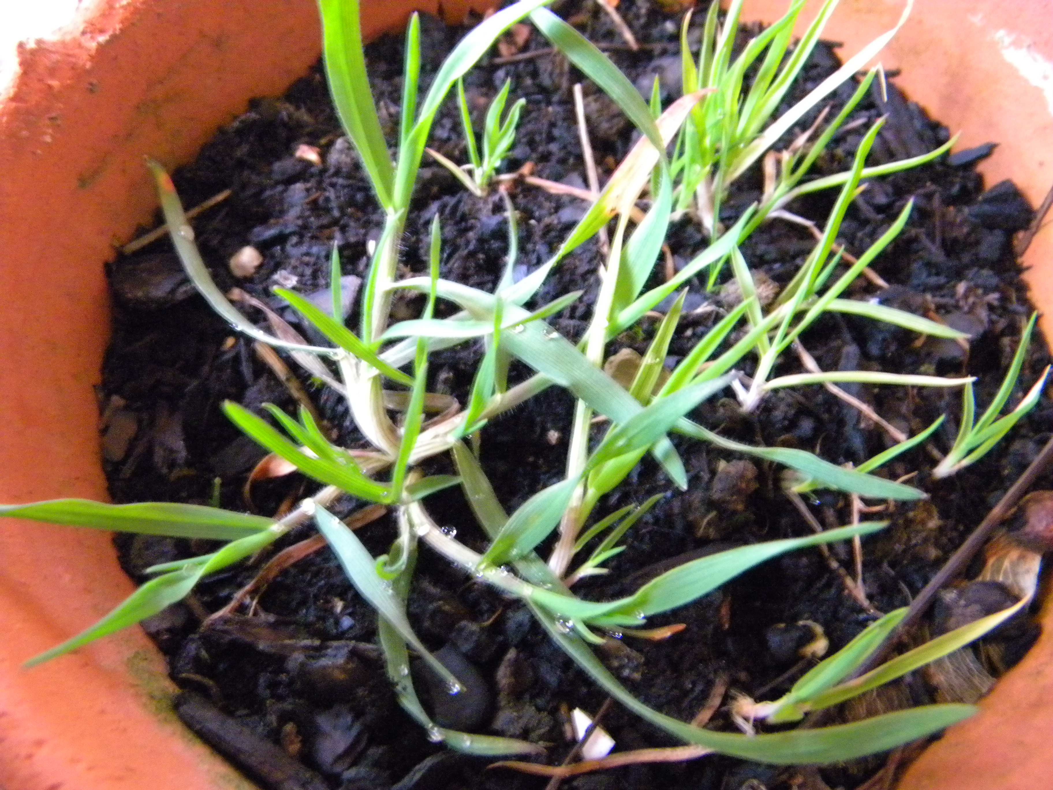 Holcus lanatus